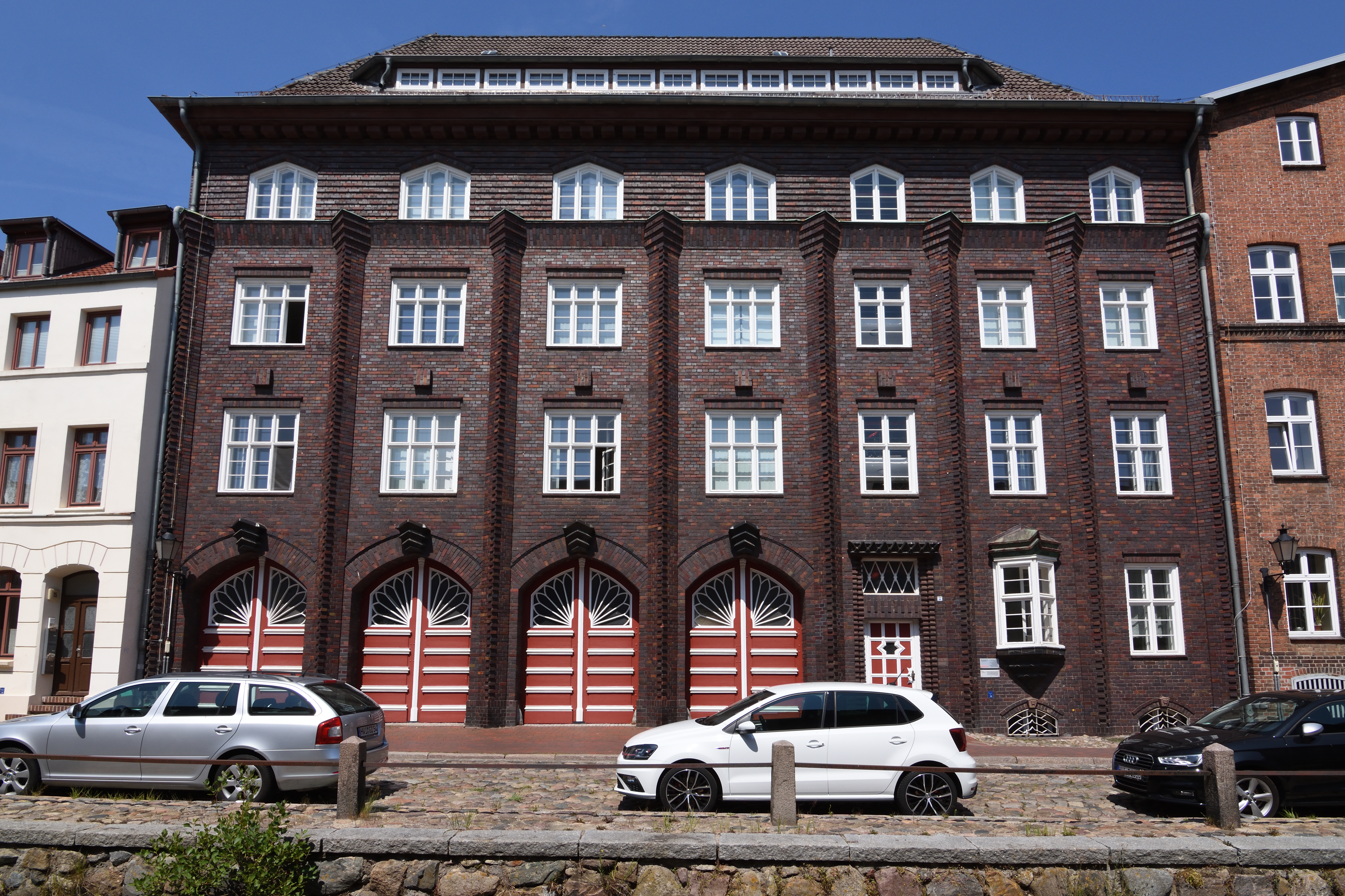 Wismar, Feuerwherhaus in der Frischen Grube